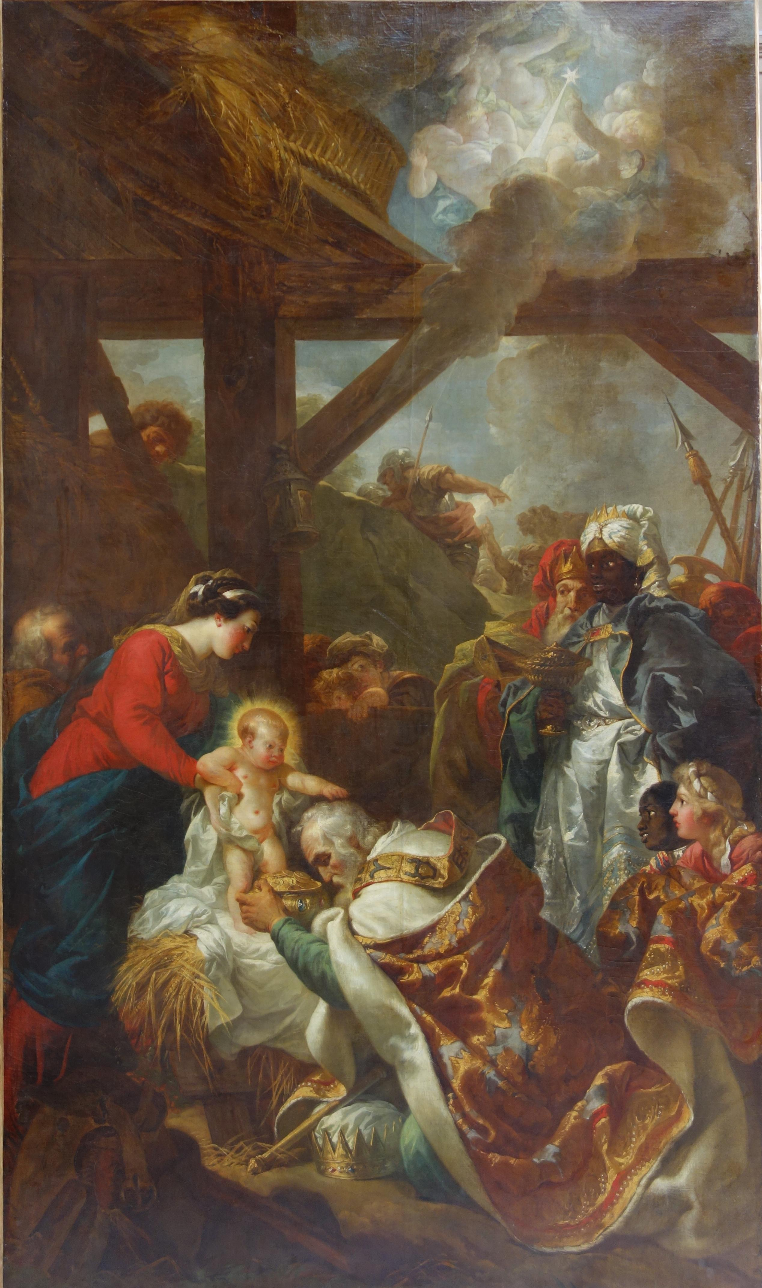 L'adoration des mages. Tableau placé dans la chapelle de Bellevue en 1767, lors des premiers agrandissements.